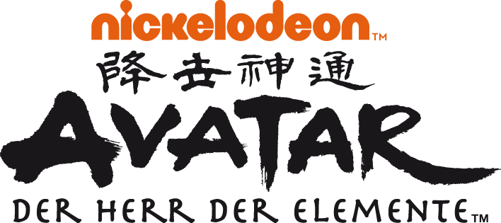 Avatar Logo (deutsch): Auf dem Logo sind die Zeichen 降世神通 zu erkennen. Das 降世 lässt sich mit „auf die Welt kommen“ übersetzen (auch Gesandter). 神通 heißt übersetzt „göttliche Fähigkeit“. Ein Avatar ist die göttliche Manifestation in Gestalt eines Lebewesens. Komplett übersetzt: „Der mit göttlichen Fähigkeiten auf die Welt gekommene Avatar“